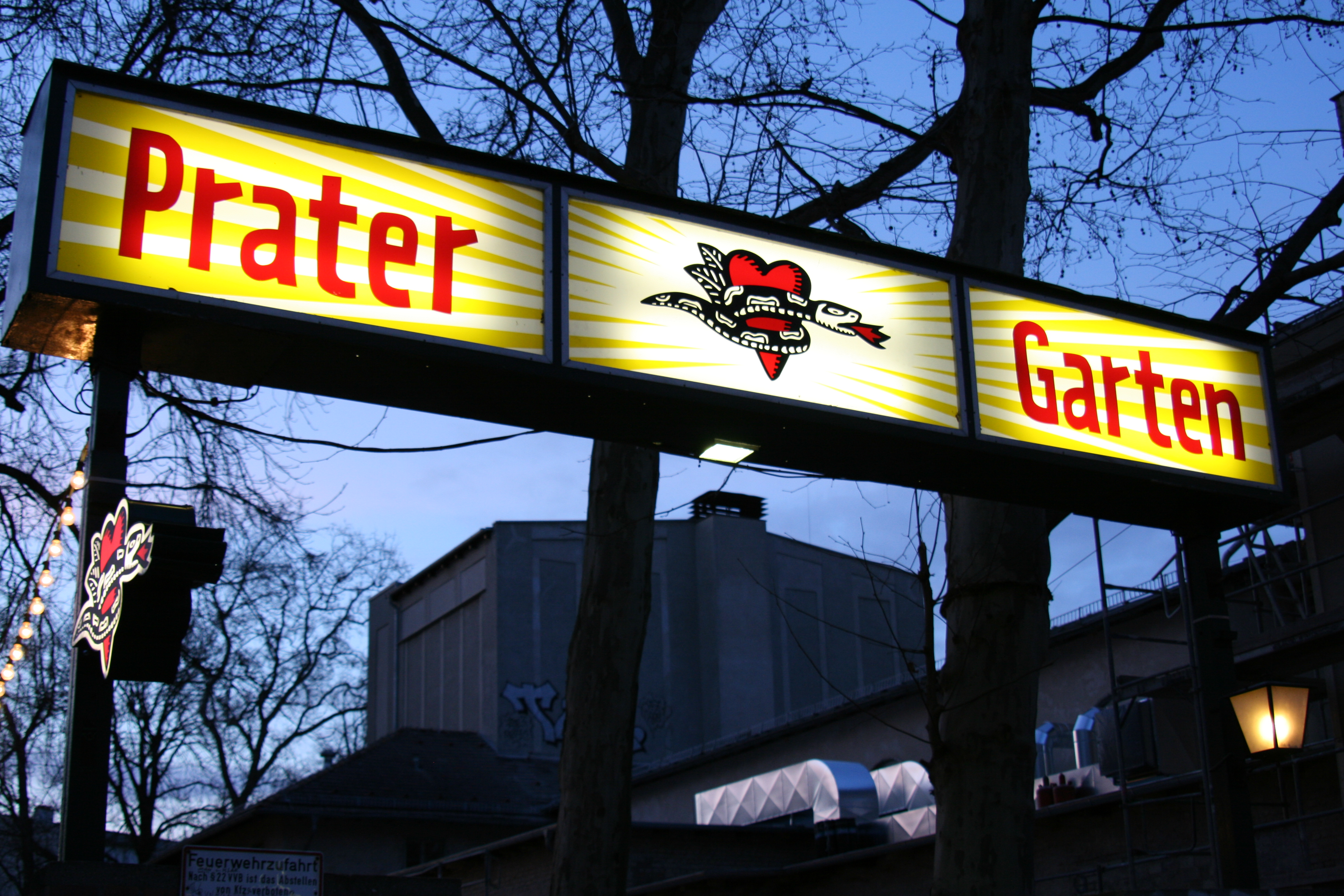 Eingang Pratergarten, Berlin, Kastanielallee